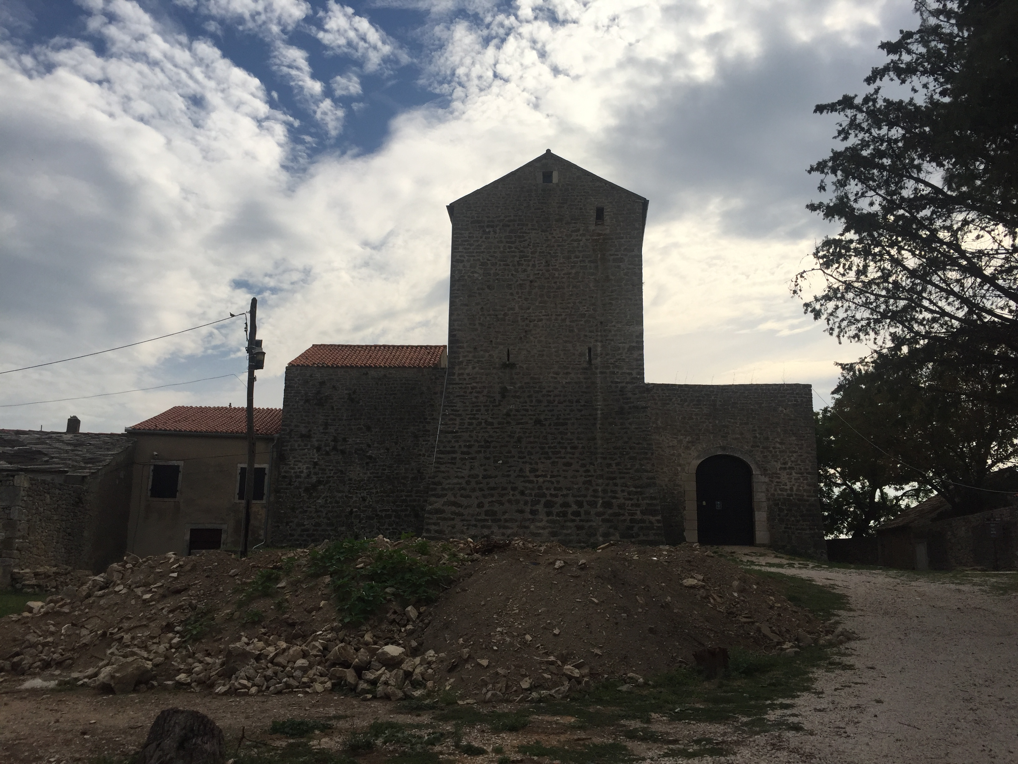 23420, Benkovac, Croatia